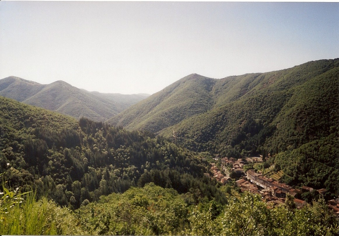 Valleraugue après quelques kms sur le sentier des 4000marches